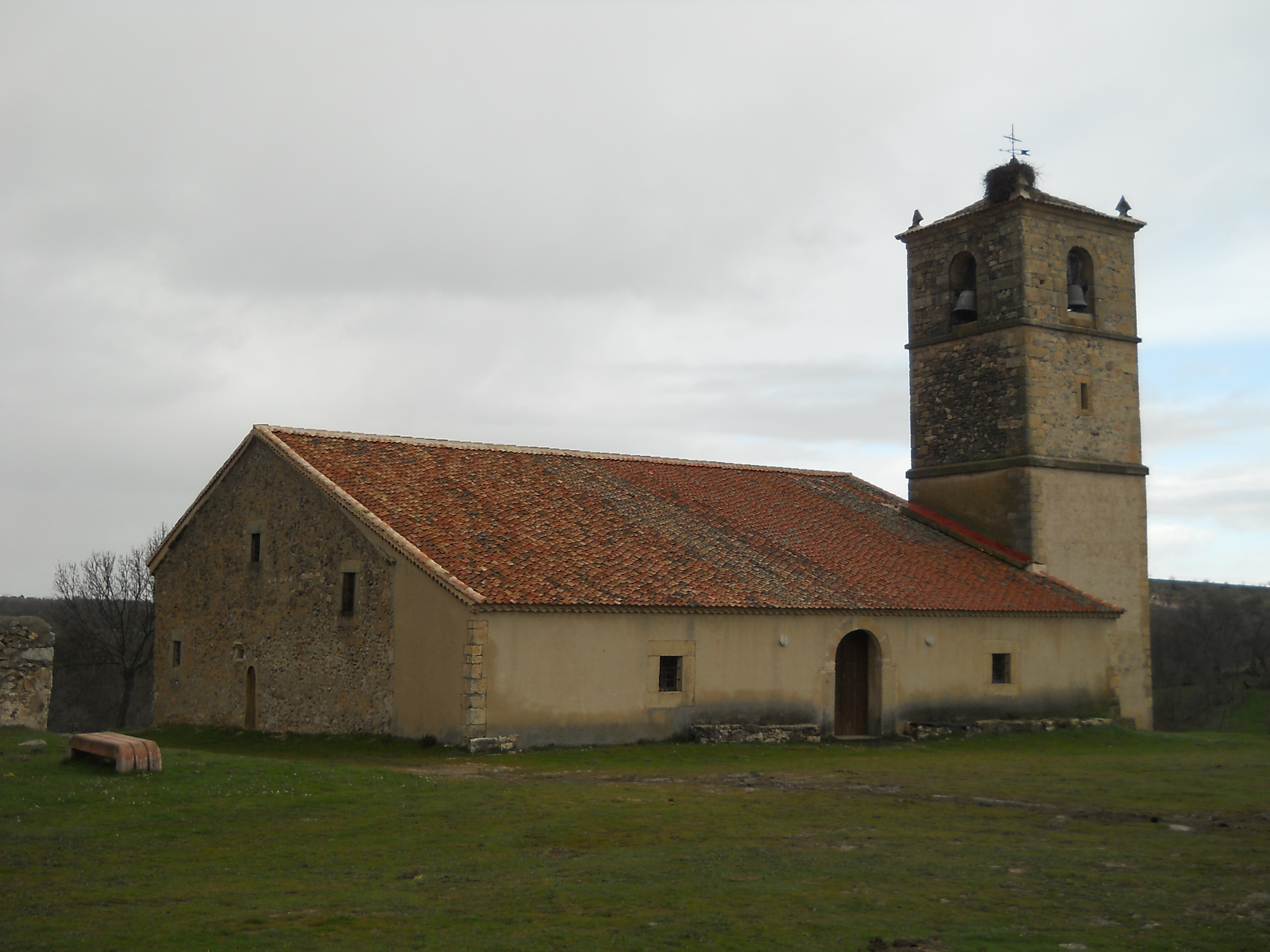 Chiesa di Nostra Signora dell'Assunzione, Aldealengua de Pedraza, Segovia, Spagna